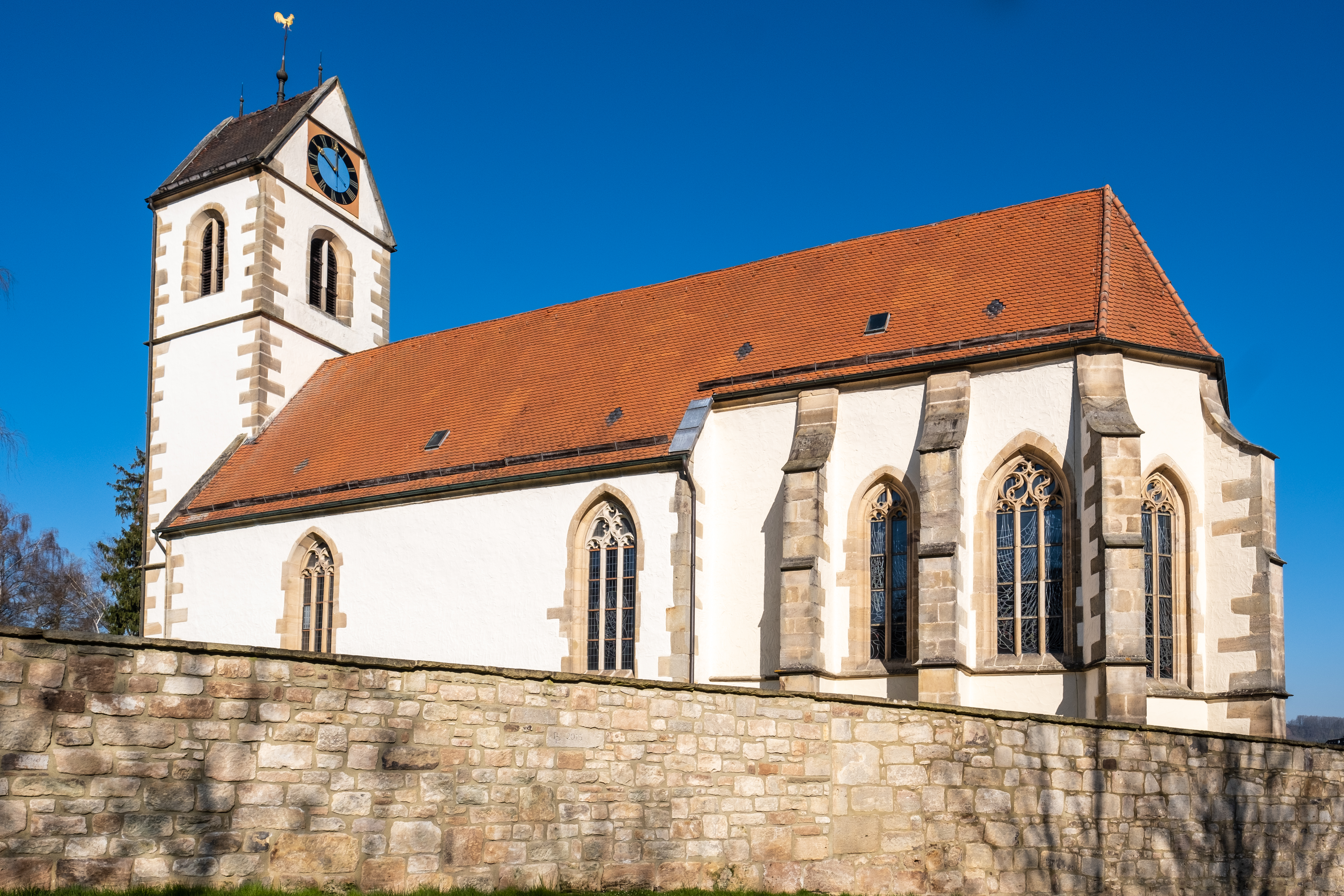 St.-Galluskirche in Derendingen